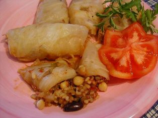 հատիկեղենով պասուց դոլմա